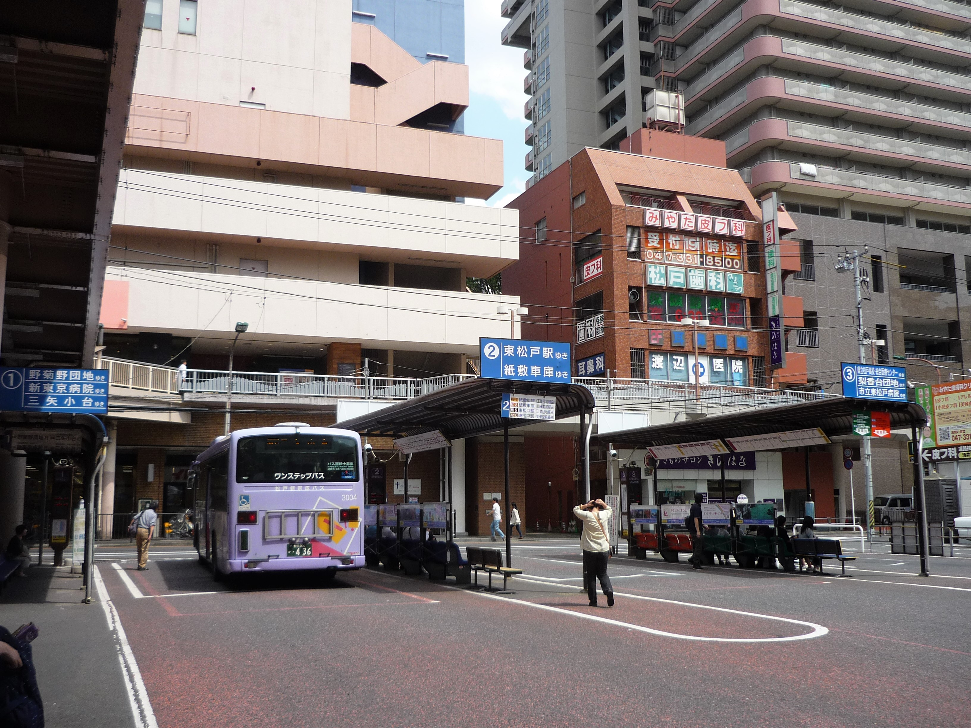 松戸駅東口バスターミナル